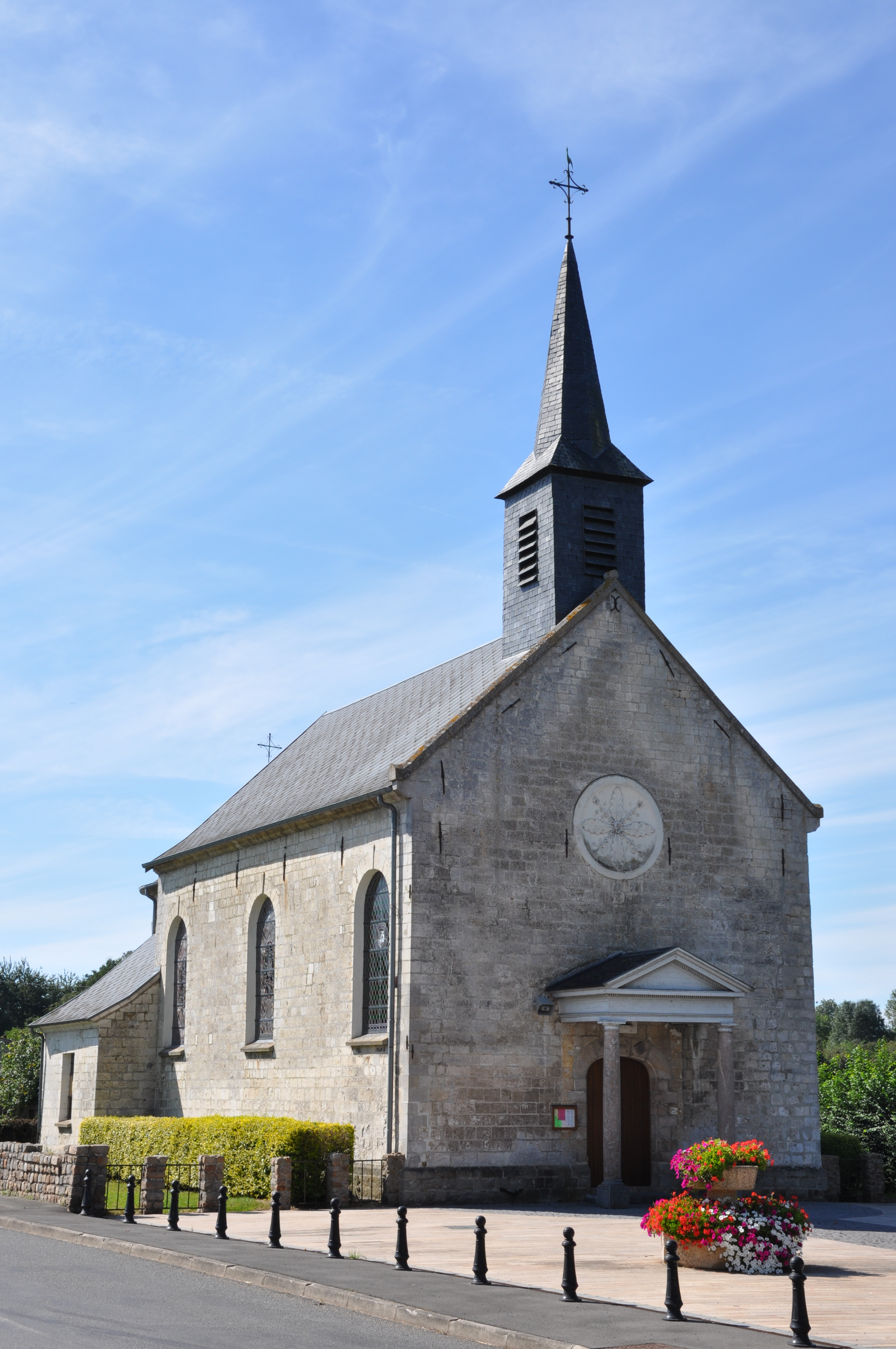 Ferfay - l'eglise